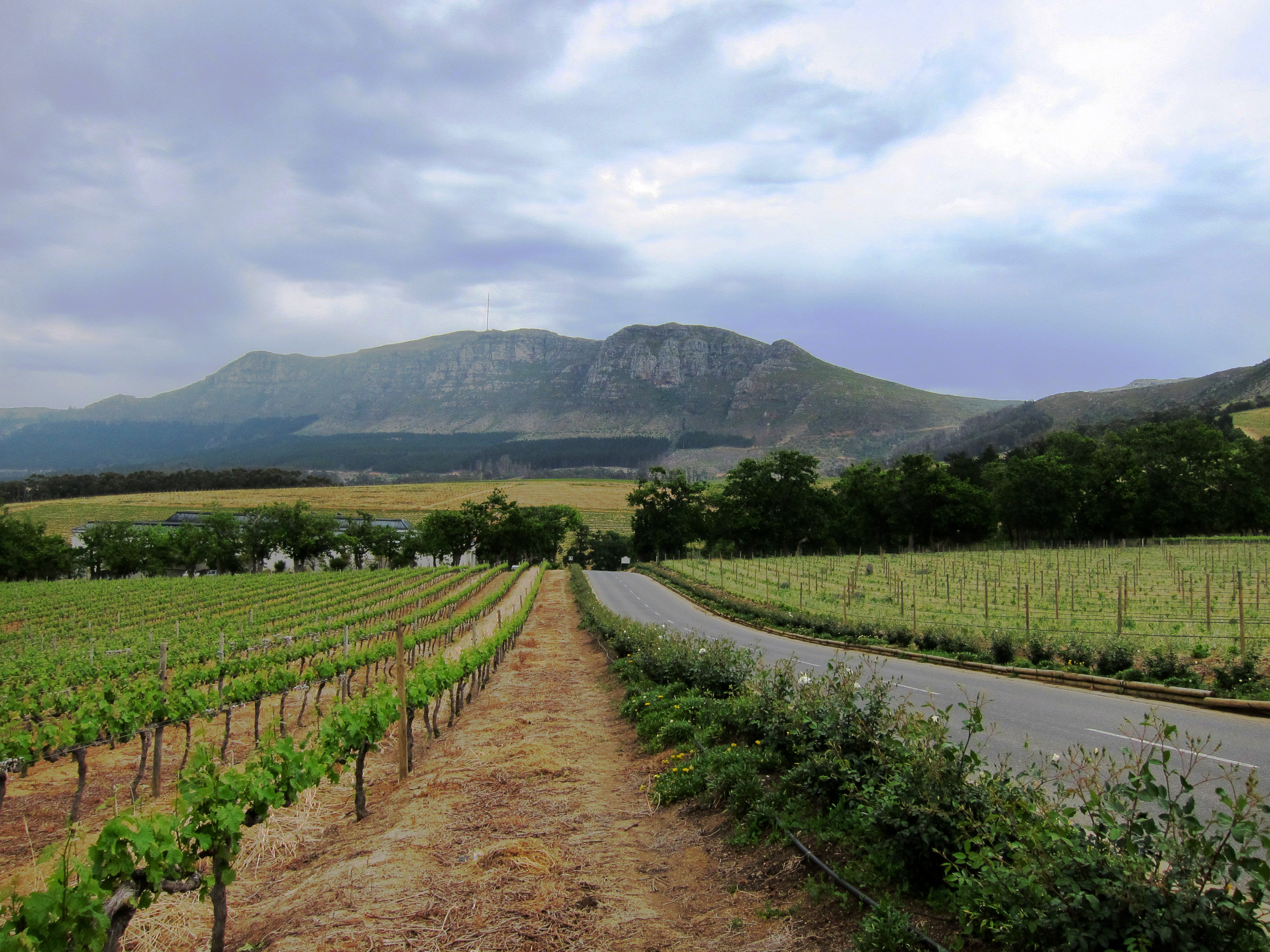 Vignoble de Groot Constantia